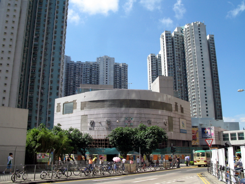 Hau Tak Shopping Centre